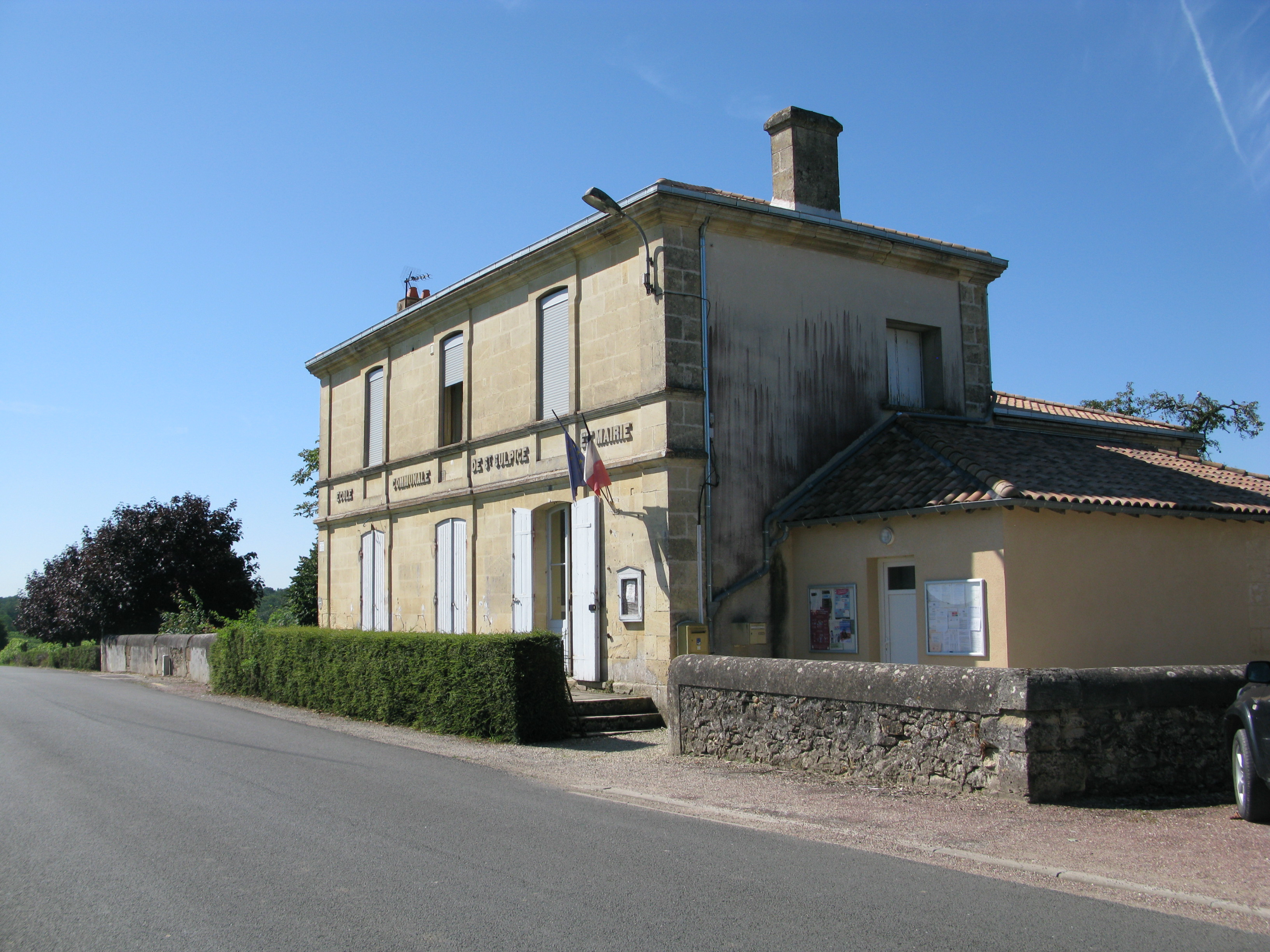 Mairie de Saint-Sulpice-de-Pommiers